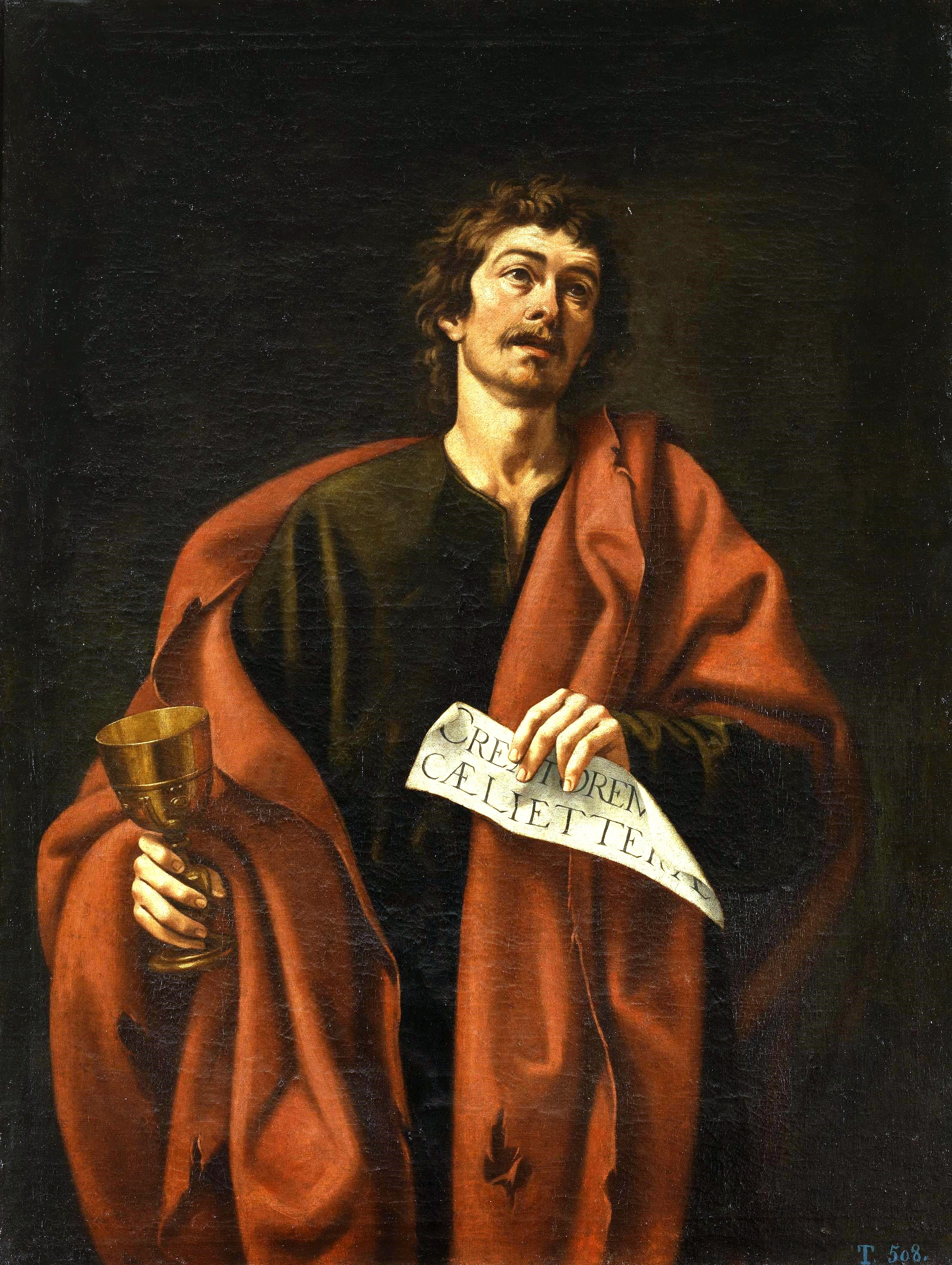 La obra representa al apóstol San Juan Evangelista, y forma parte de uno de los Apostolados pintados por Cristóbal García Salmerón.